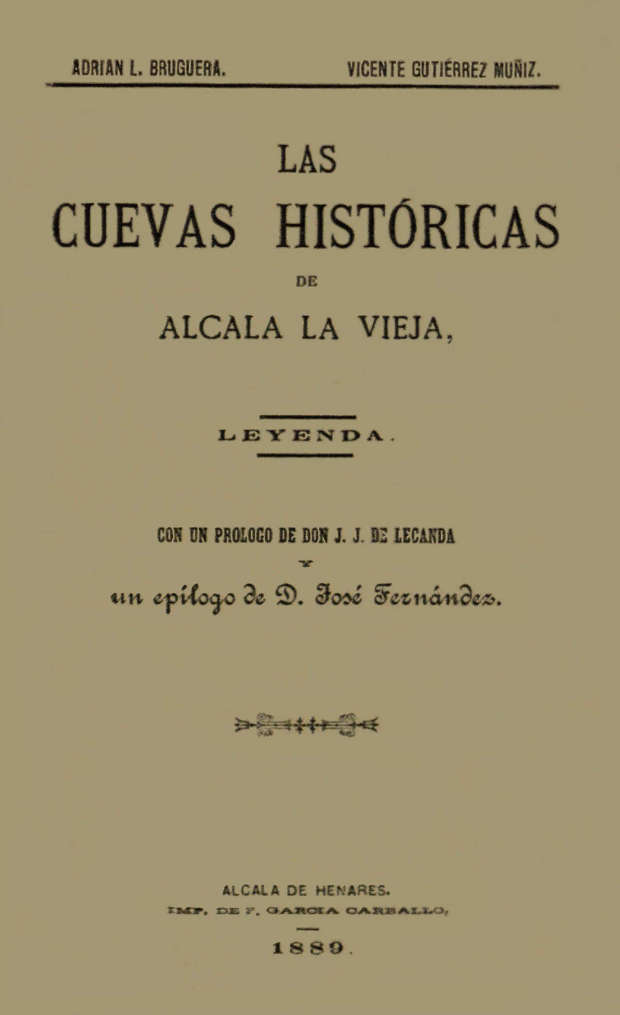 Portada del libro "Las cuevas históricas de Alcalá la Vieja", publicado por Adrián López Bruguera y Vicente Gutiérrez Muñiz, en 1889 en Alcalá de Henares.